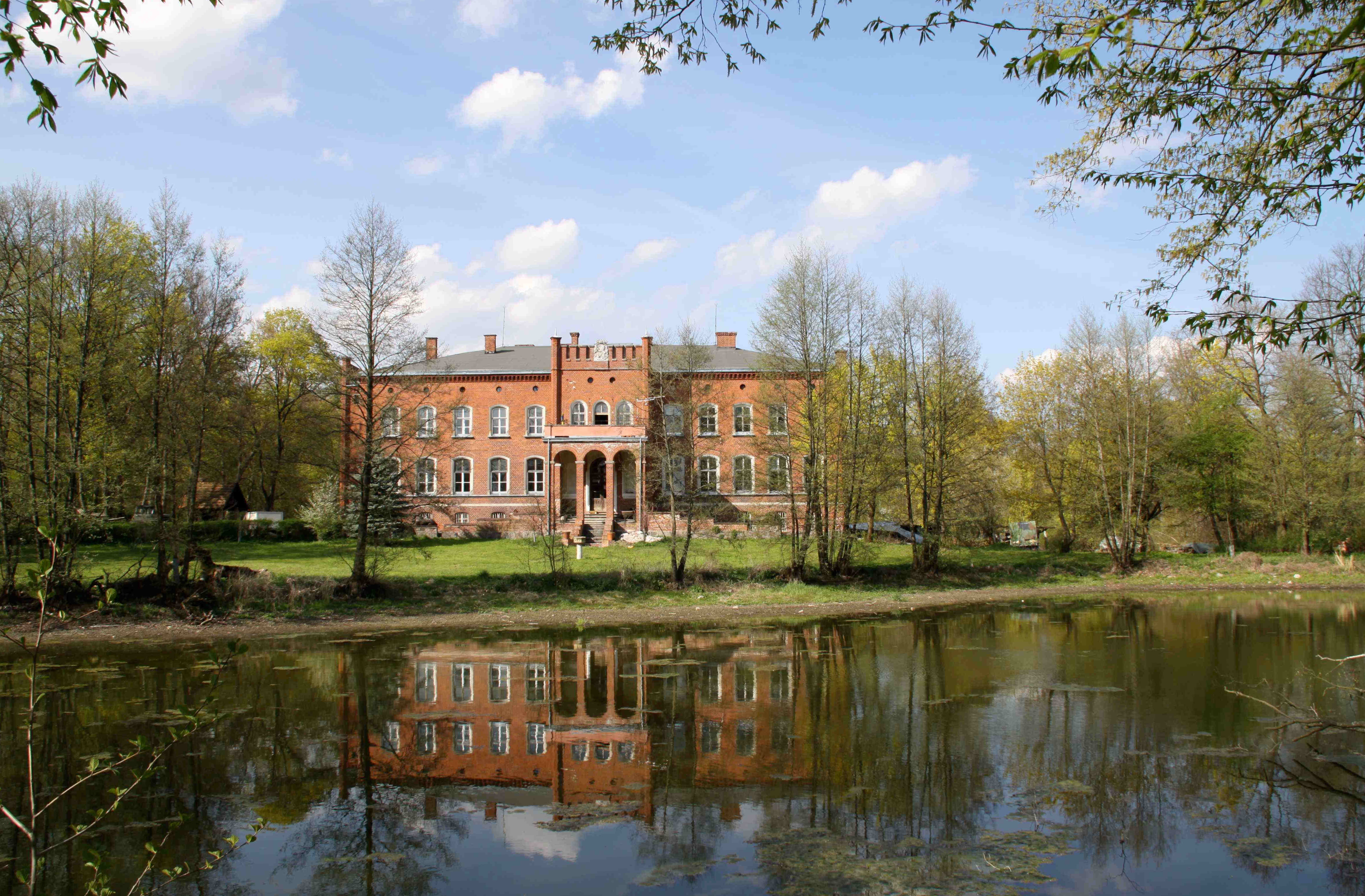 Juditten - Vorderansicht